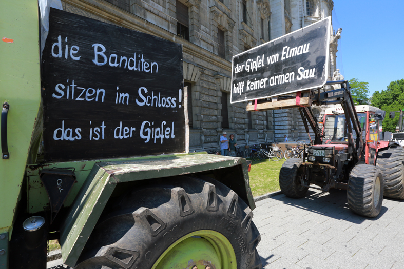 Gipfel der Alternativen in München - Protest gegen den G7-Gipfel 2015 in Schloss Elmau